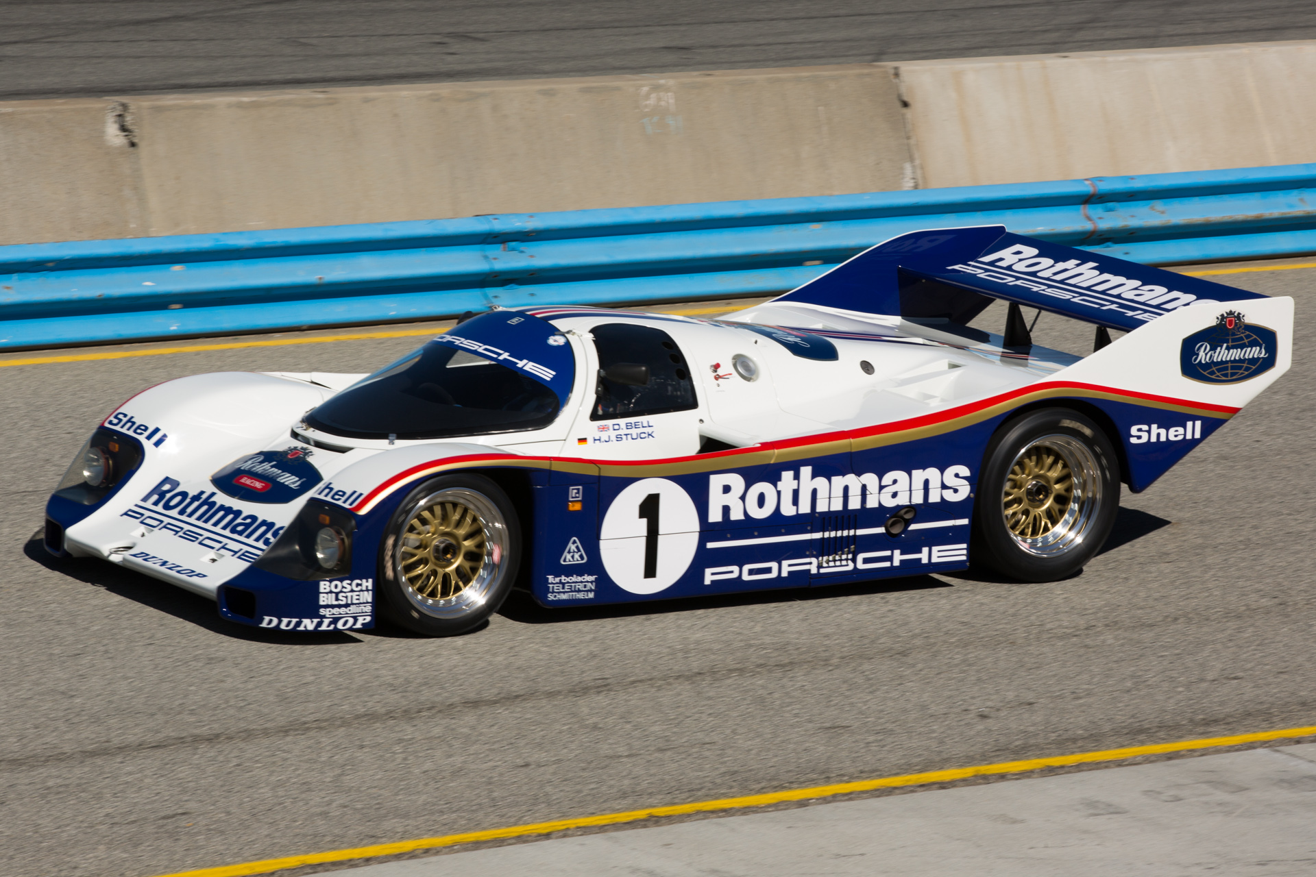 Rennsport Reunion V